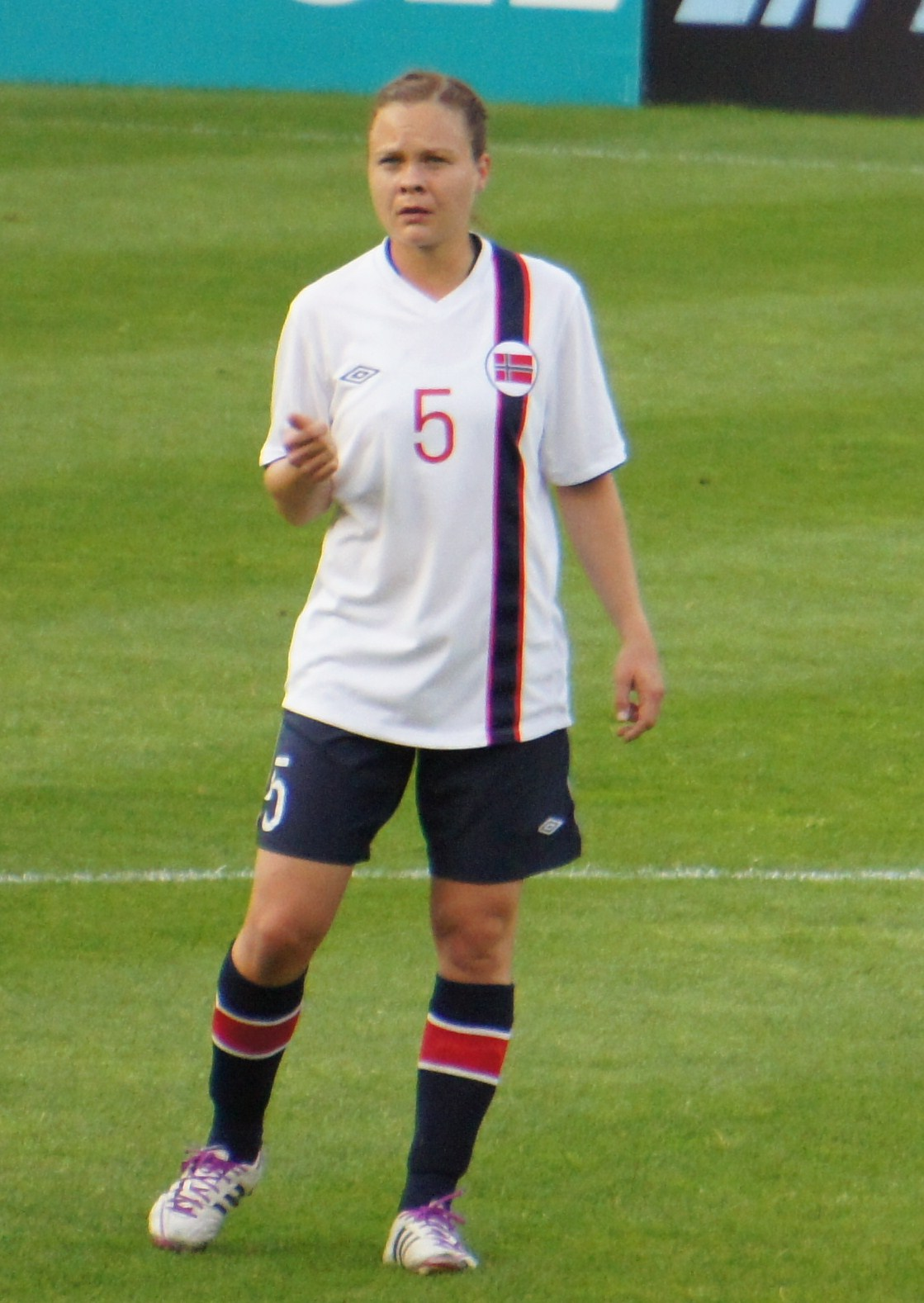 En équipe de Norvège.